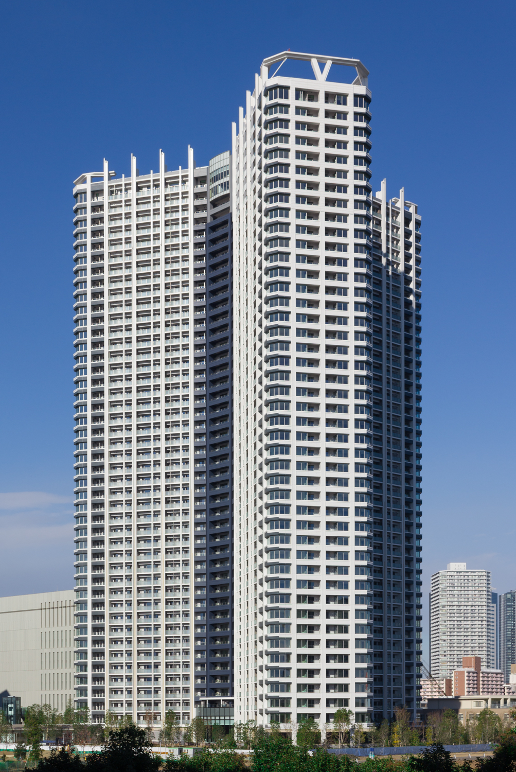 SKYZ TOWER (東京都江東区豊洲6丁目)。地上44階・地下2階。高さ148.9m(最高部高さ154.9m)